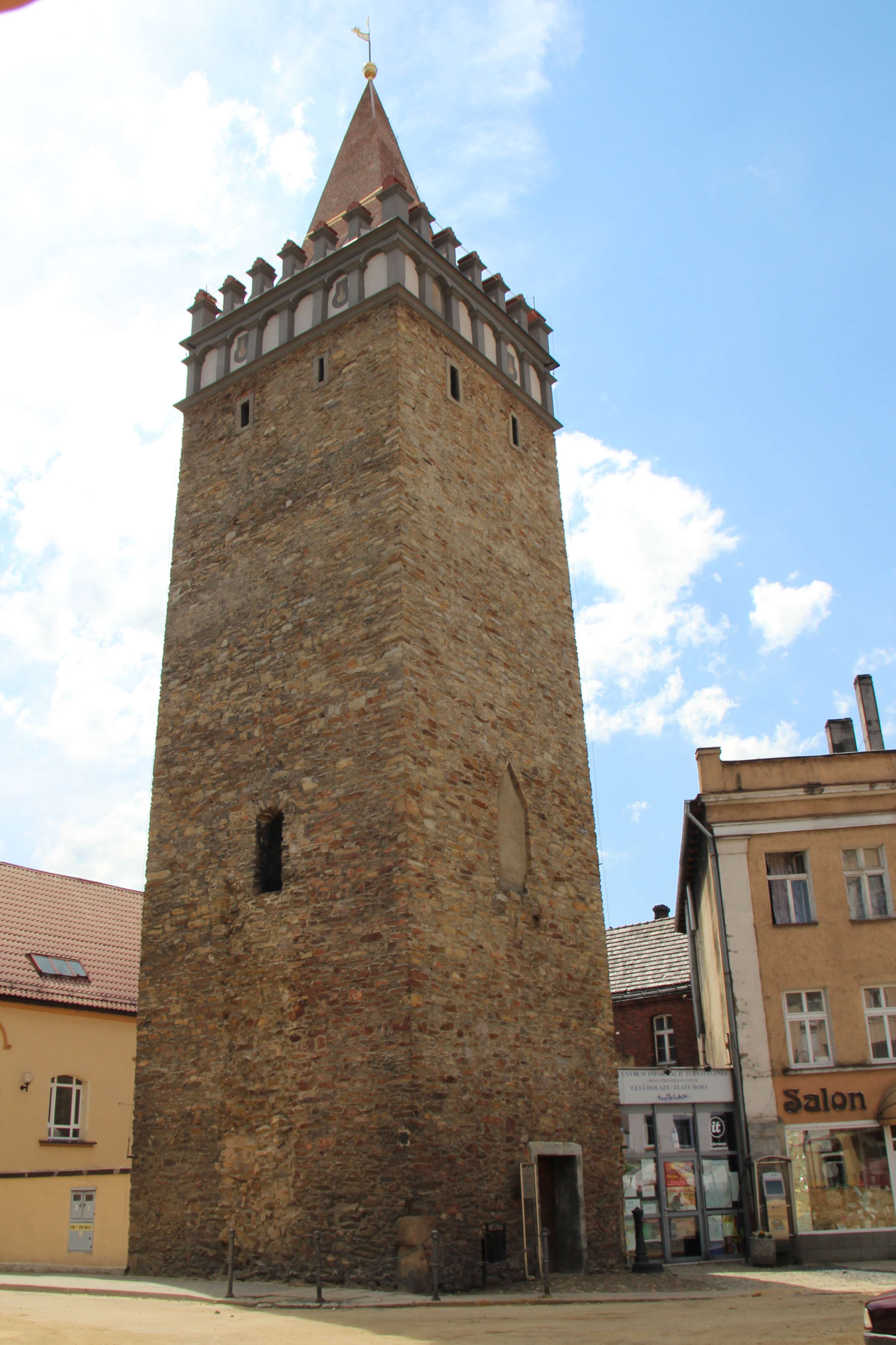 Głuchołazy - miasto w Polsce w województwie opolskim, w powiecie nyskim.